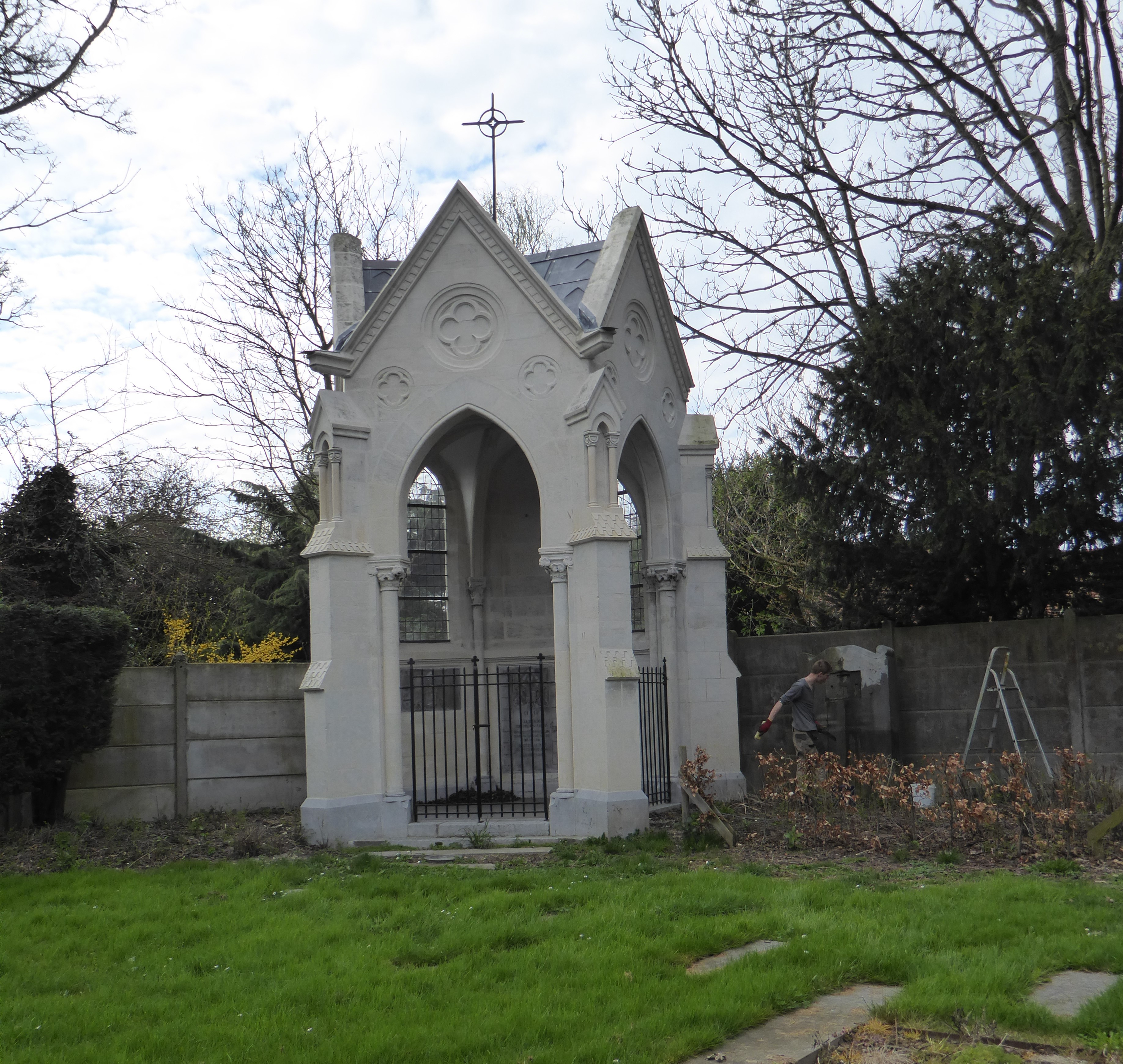 la chapelle des comtes d'Hespel d'Hocron Salomé_(Nord), France